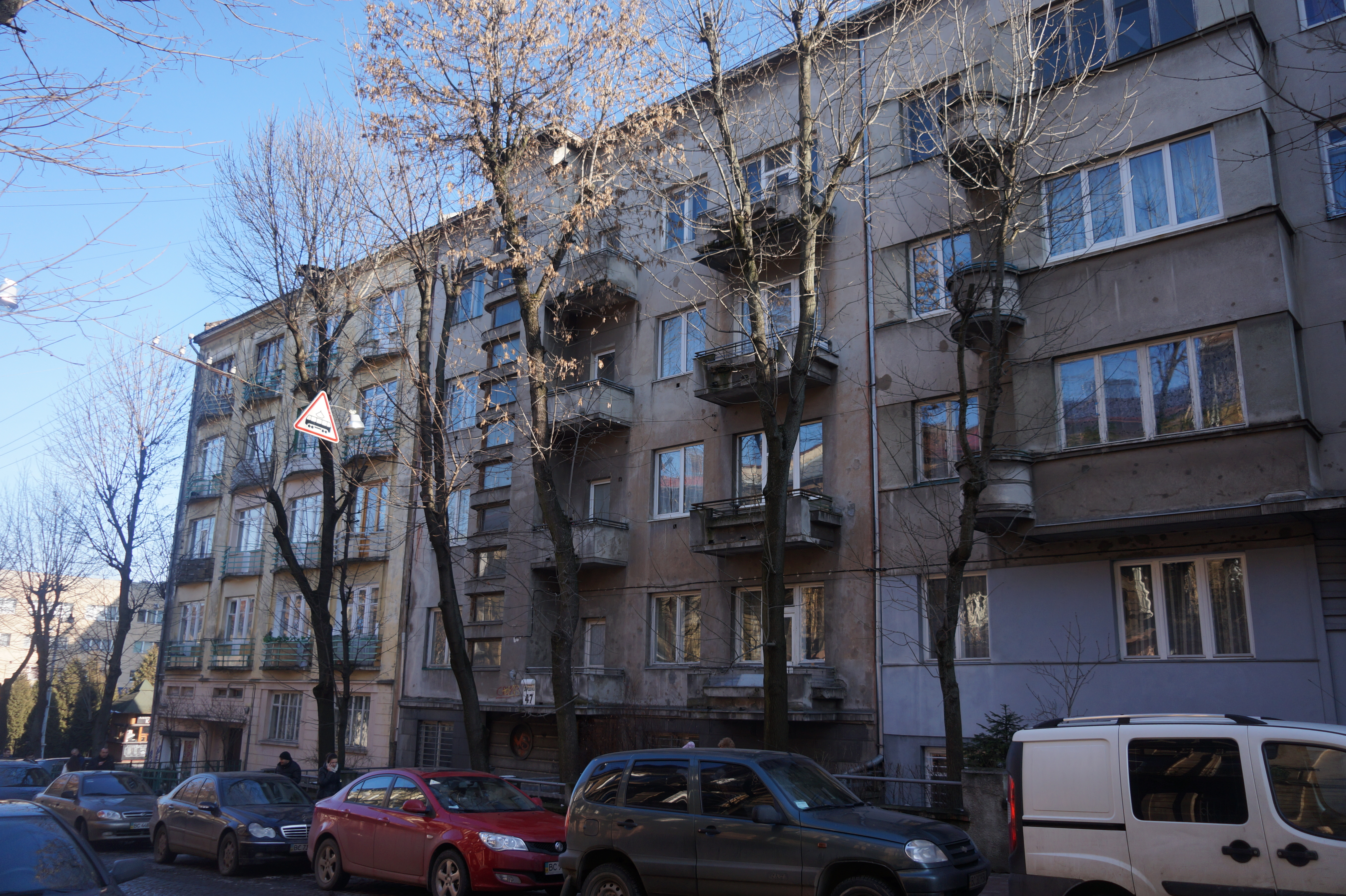 житловий будинок, Львів, Дорошенка П., 47